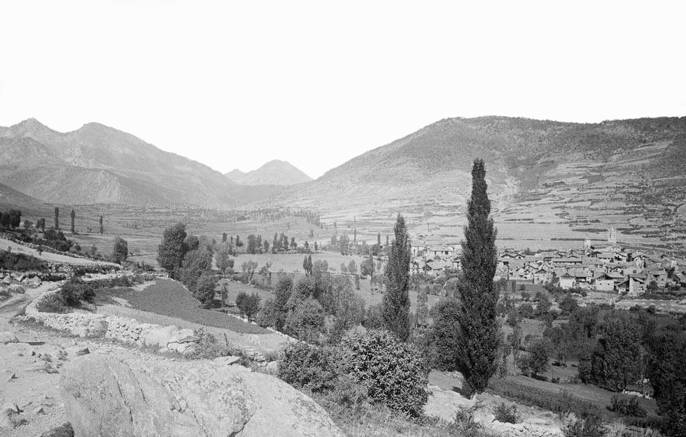 Imatge